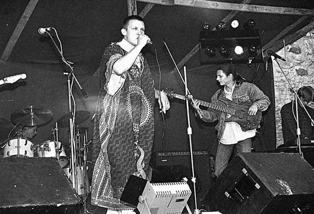 Jan Uuspõllu ansambel Luxury Filters